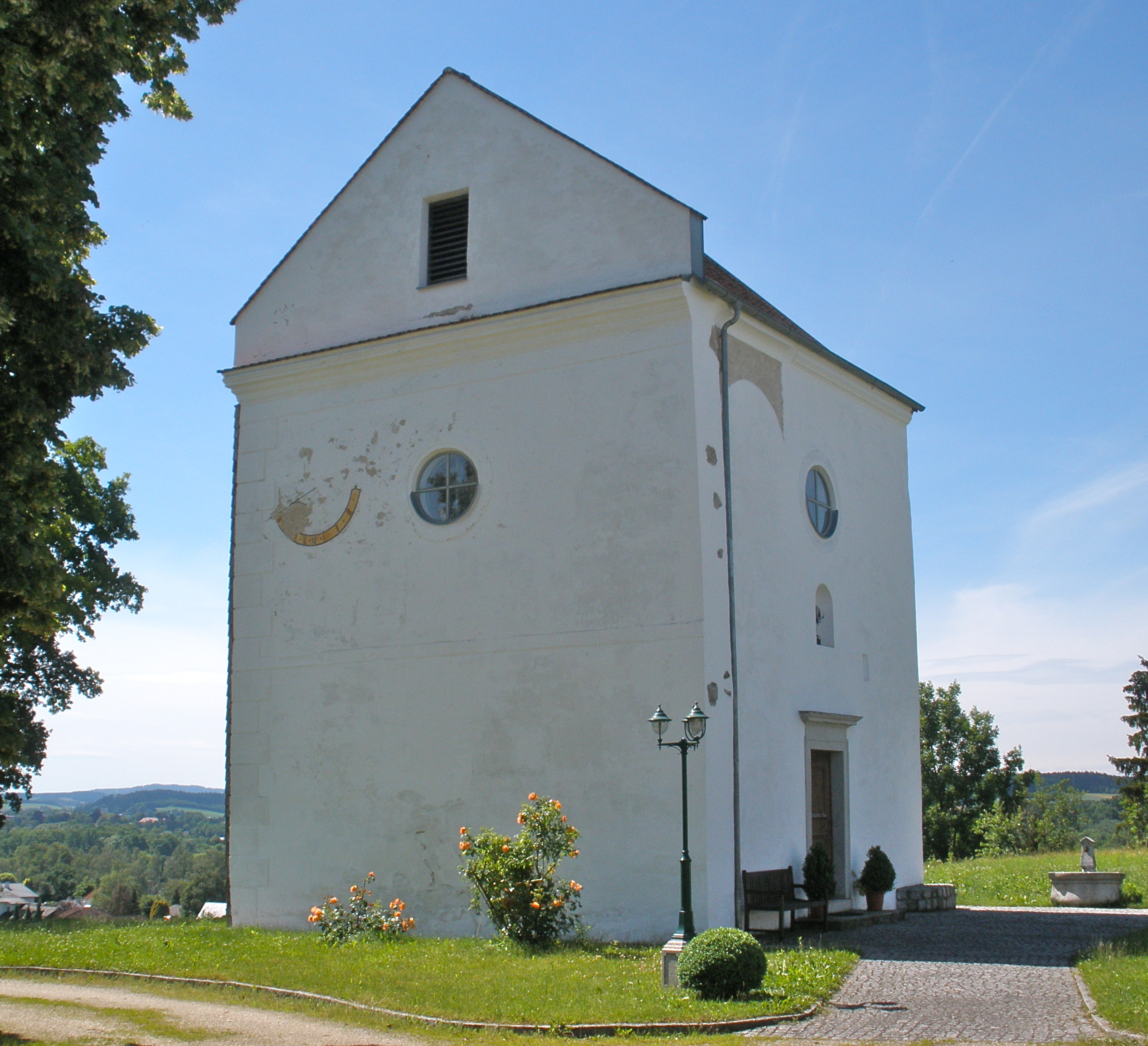 Bei der Schlosskapelle Mitterberg handelt es sich um einen restlichen Baukörper einer großen barocken Schlossanlage. Sie wurde vom Verein "Schlosskapelle Mitterberg" saniert; 2003 erfolgte die feierliche ökumenische Einweihung.